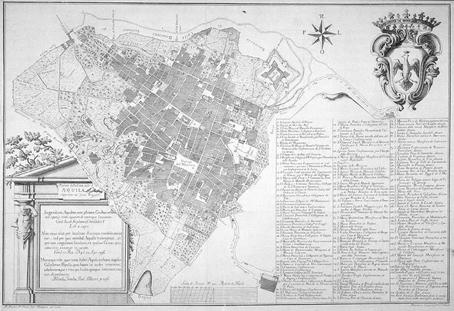 Pianta dell'Aquila realizzata nel 1753 da Antonio Francesco Vandi con evidenziata la cinta muraria, le porte urbiche e la suddivisione in locali della parte di città "intra moenia".